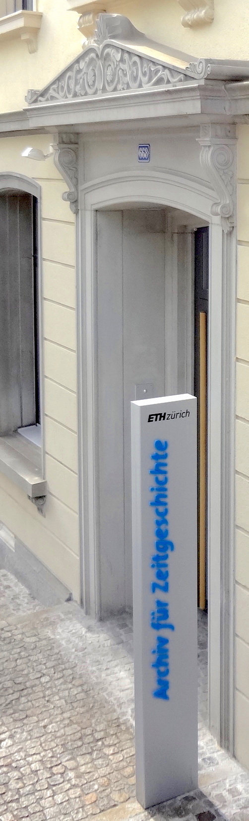 Eintritt Archiv für Zeitgeschichte der ETH Zürich